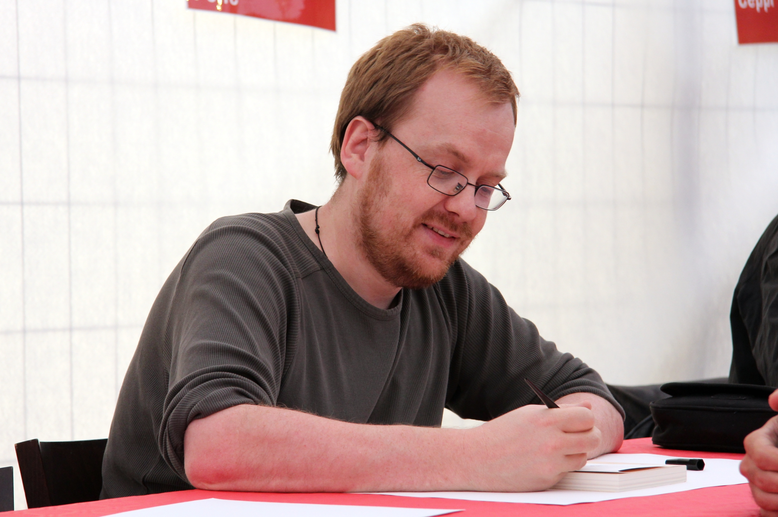 Boulet en dédicace à BD-FIL, à Lausanne.